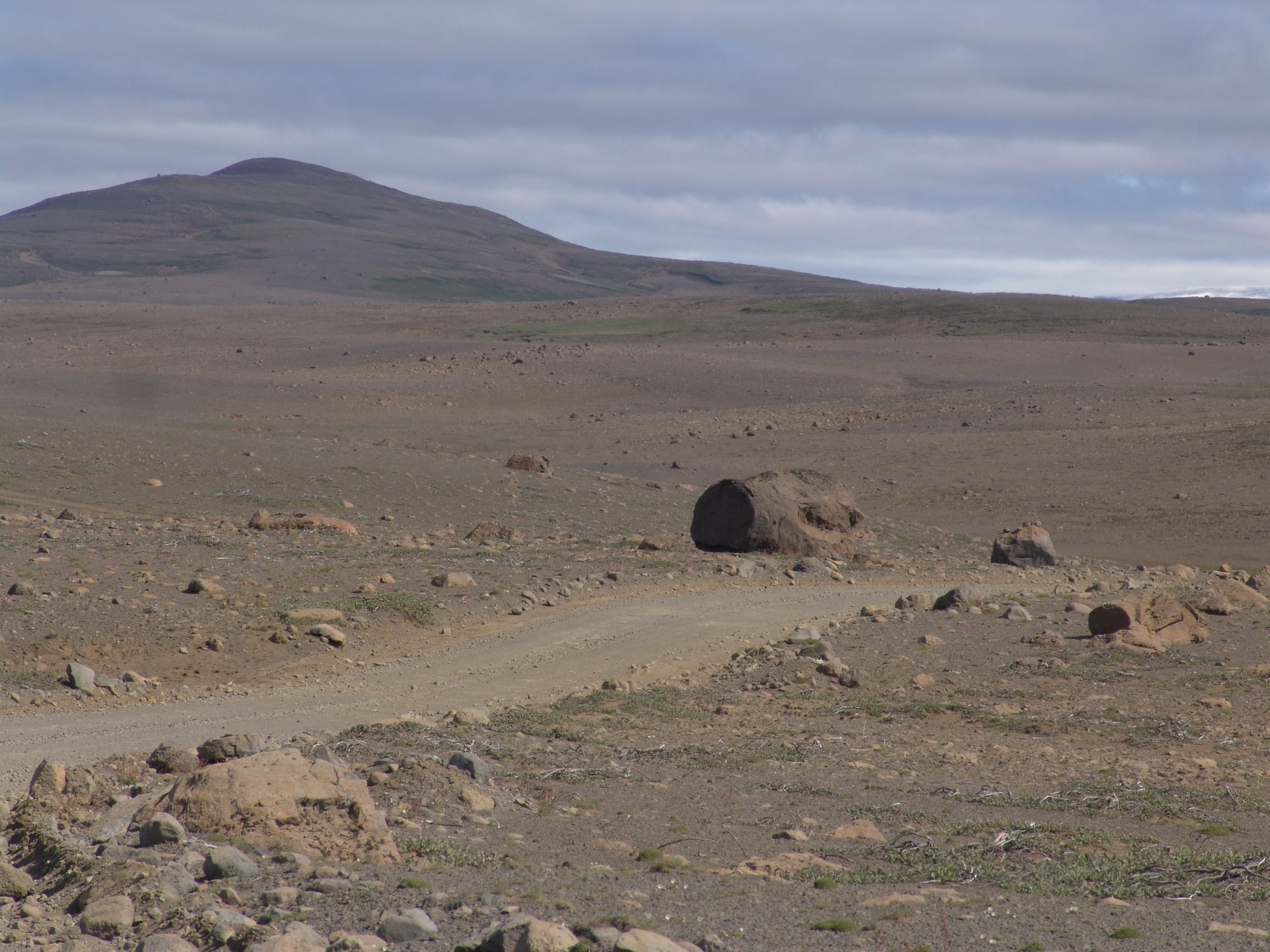 Island, Landschaft.